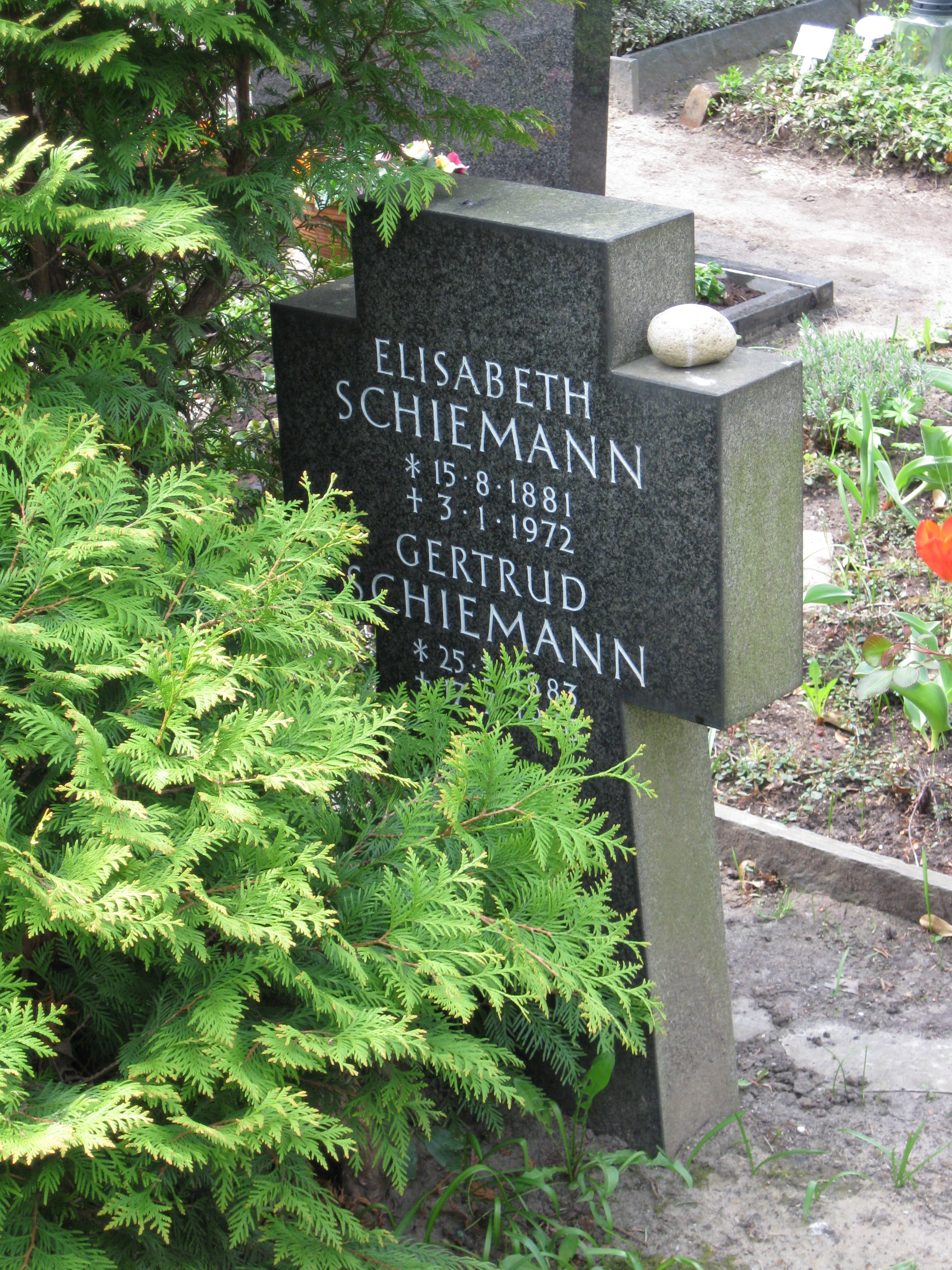 Grabstein der Biologin Elisabeth Schiemann auf dem St.Annen-Friedhof Dahlem; das Grab ist seit 2018 ein Ehrengrab der Stadt Berlin